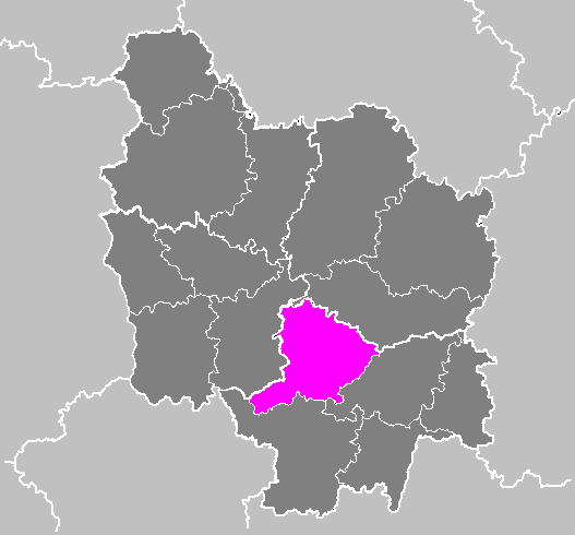 Maps of arrondissements and cantons of France: Arrondissement d Autun.PNG (Région Bourgogne)